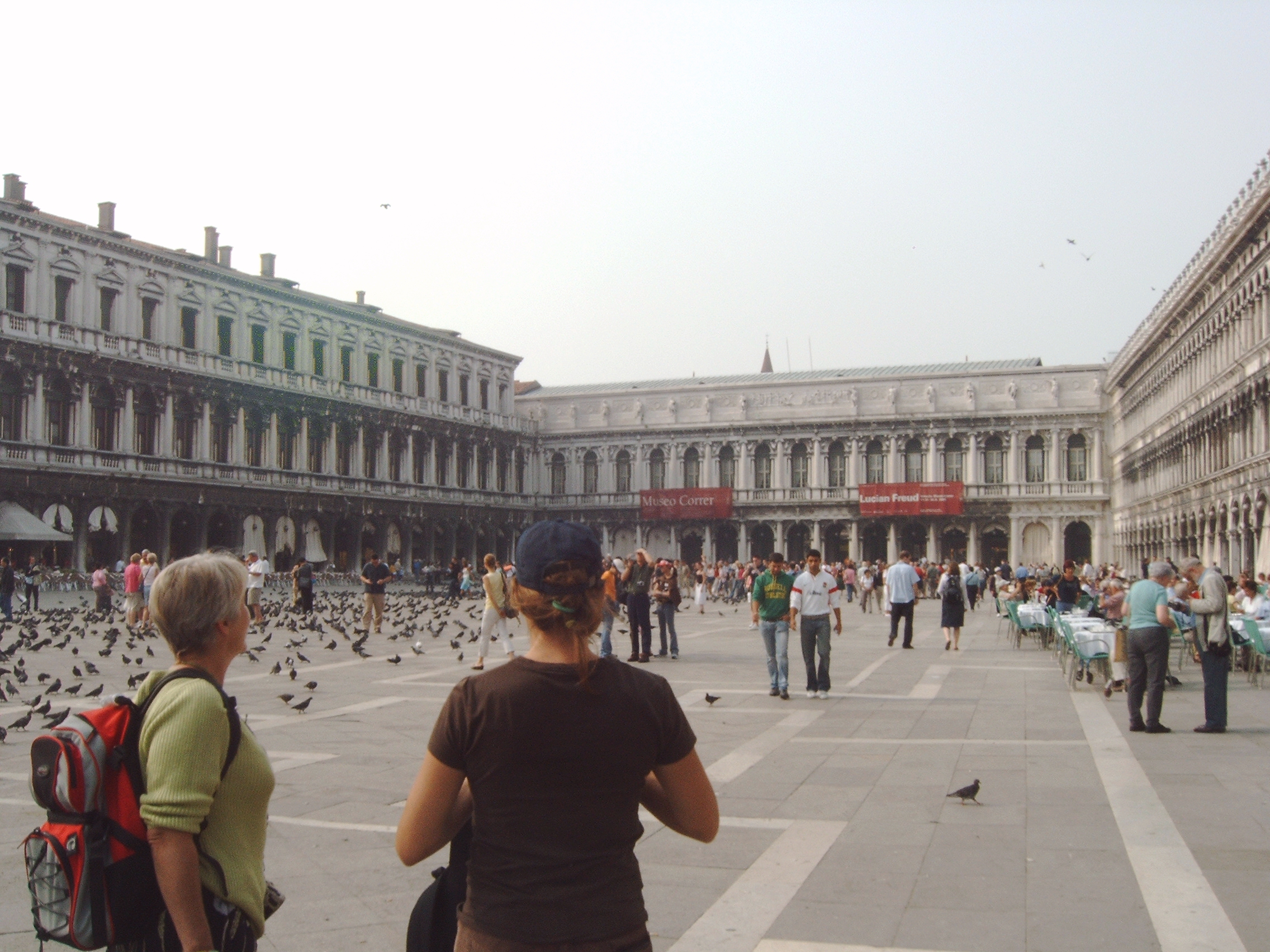 Markusplatz in Venedig